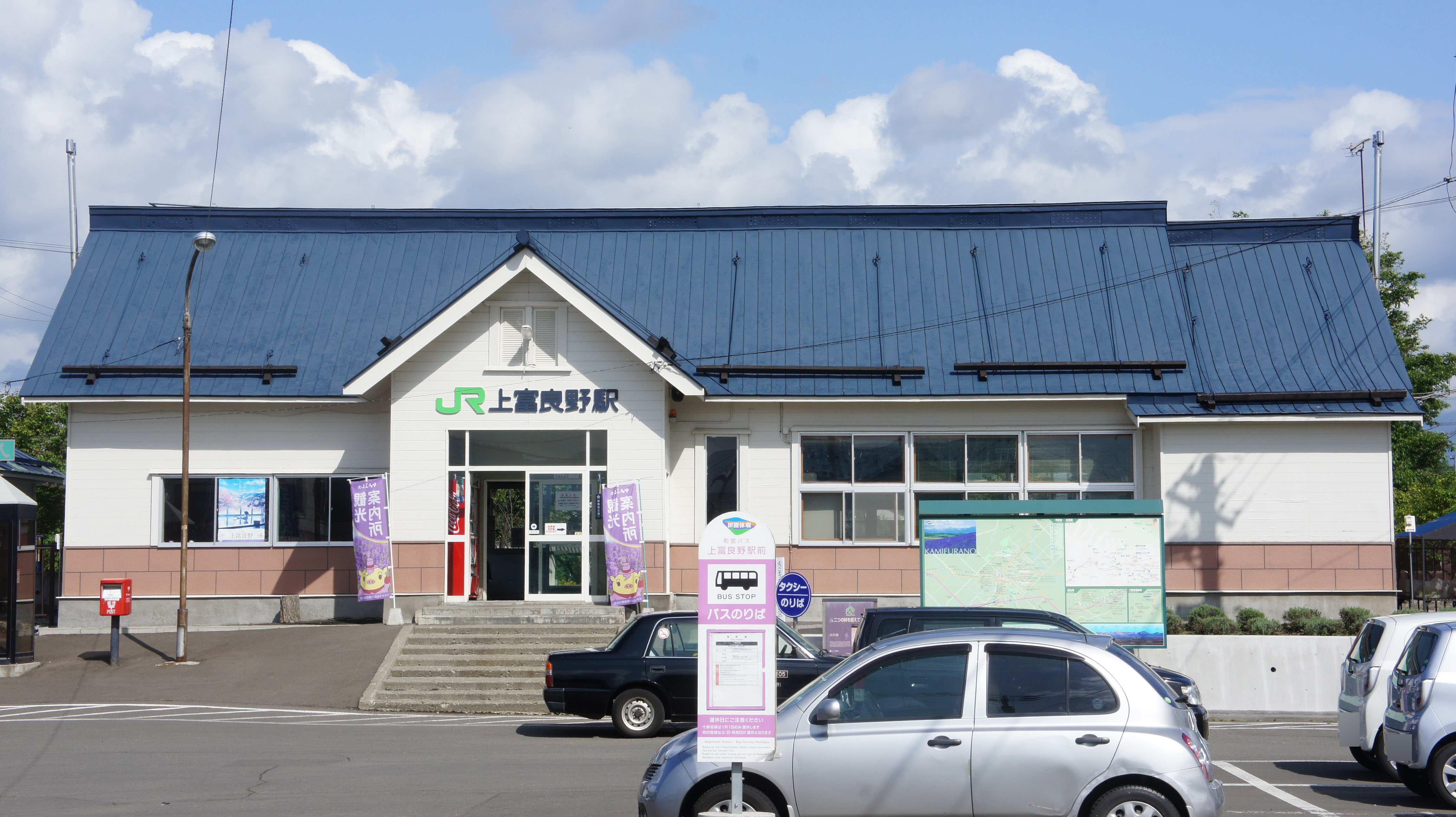 JR富良野線・上富良野駅の駅舎 Sony NEX-3